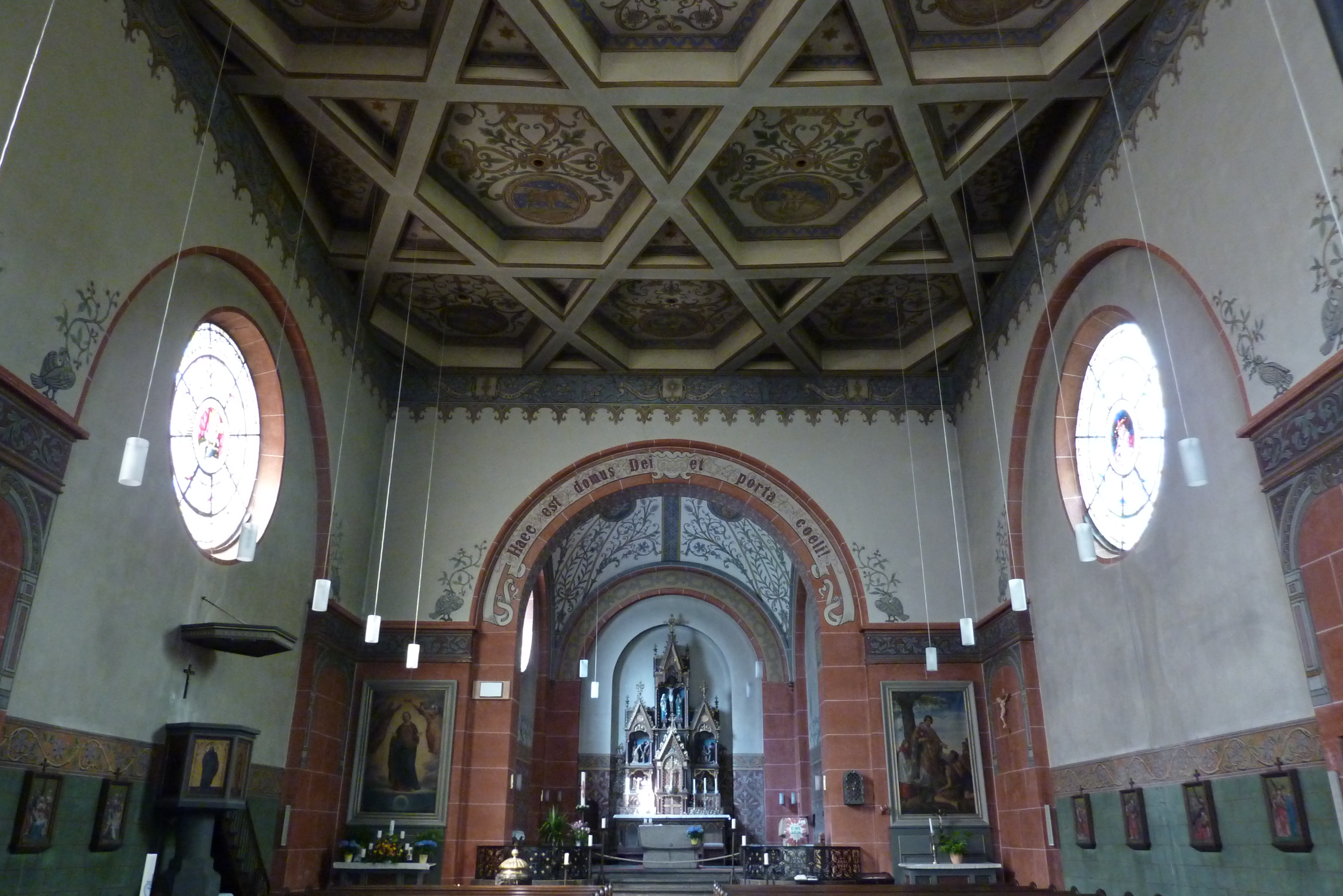 katholische Pfarrkirche St. Lubentius in Kobern-Gondorf, Innenraum